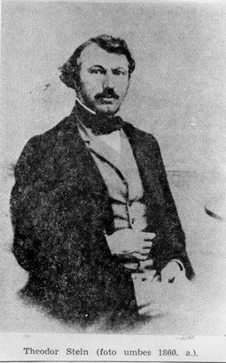 Theodor Stein 1860. aastatel